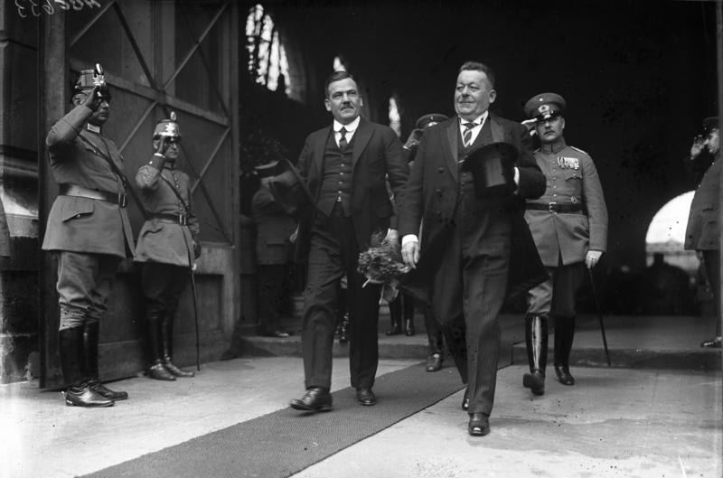 Die Ankunft des mexikanischen Präsidenten Calles in Berlin. Präsident Calles wurde auf dem Lehrter Bahnhof vom Reichspräsidenten Ebert empfangen. Präsident Calles links und Reichspräsident Ebert rechts verlassen den Bahnhof.